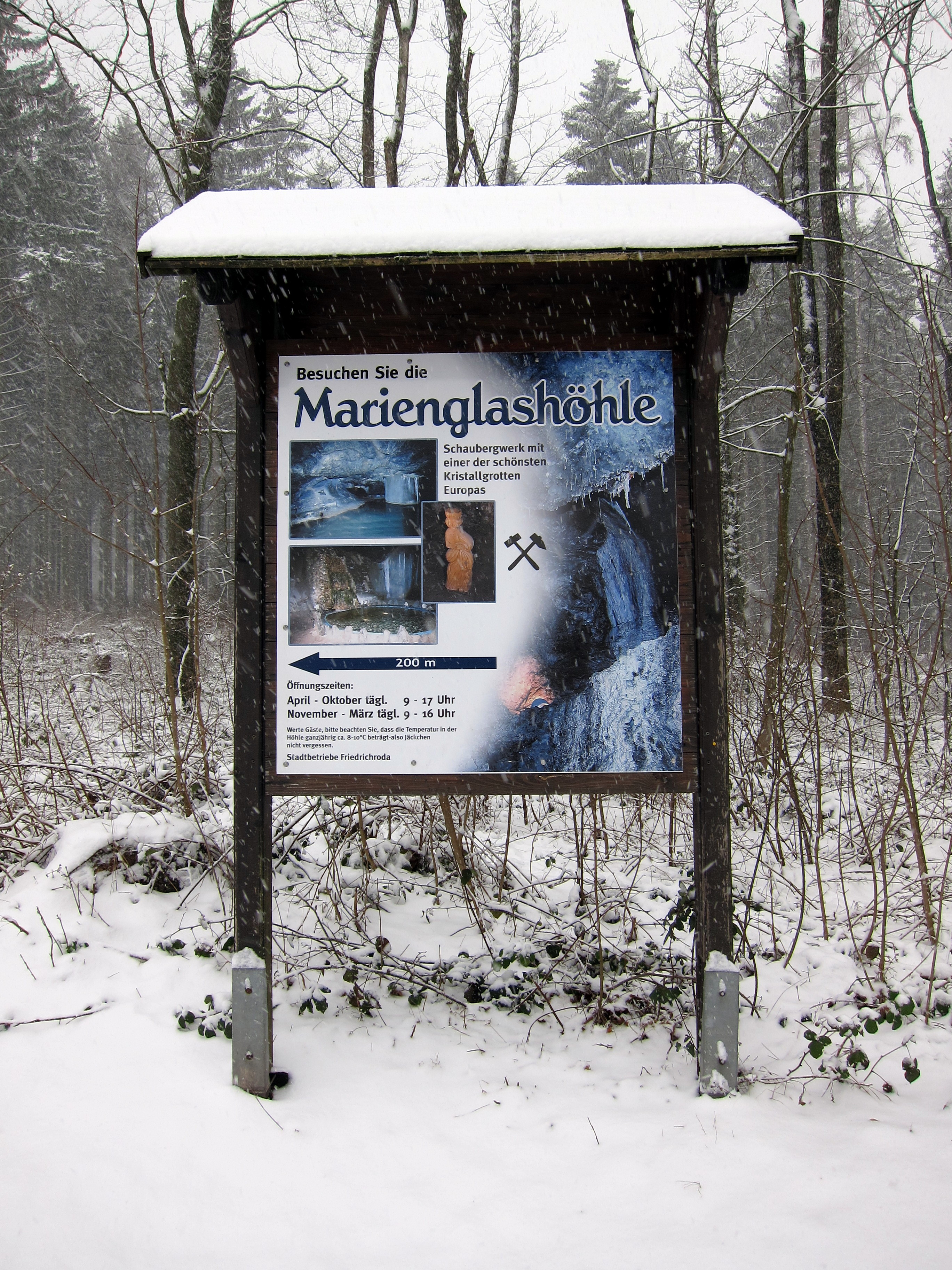 Marienglashöhle